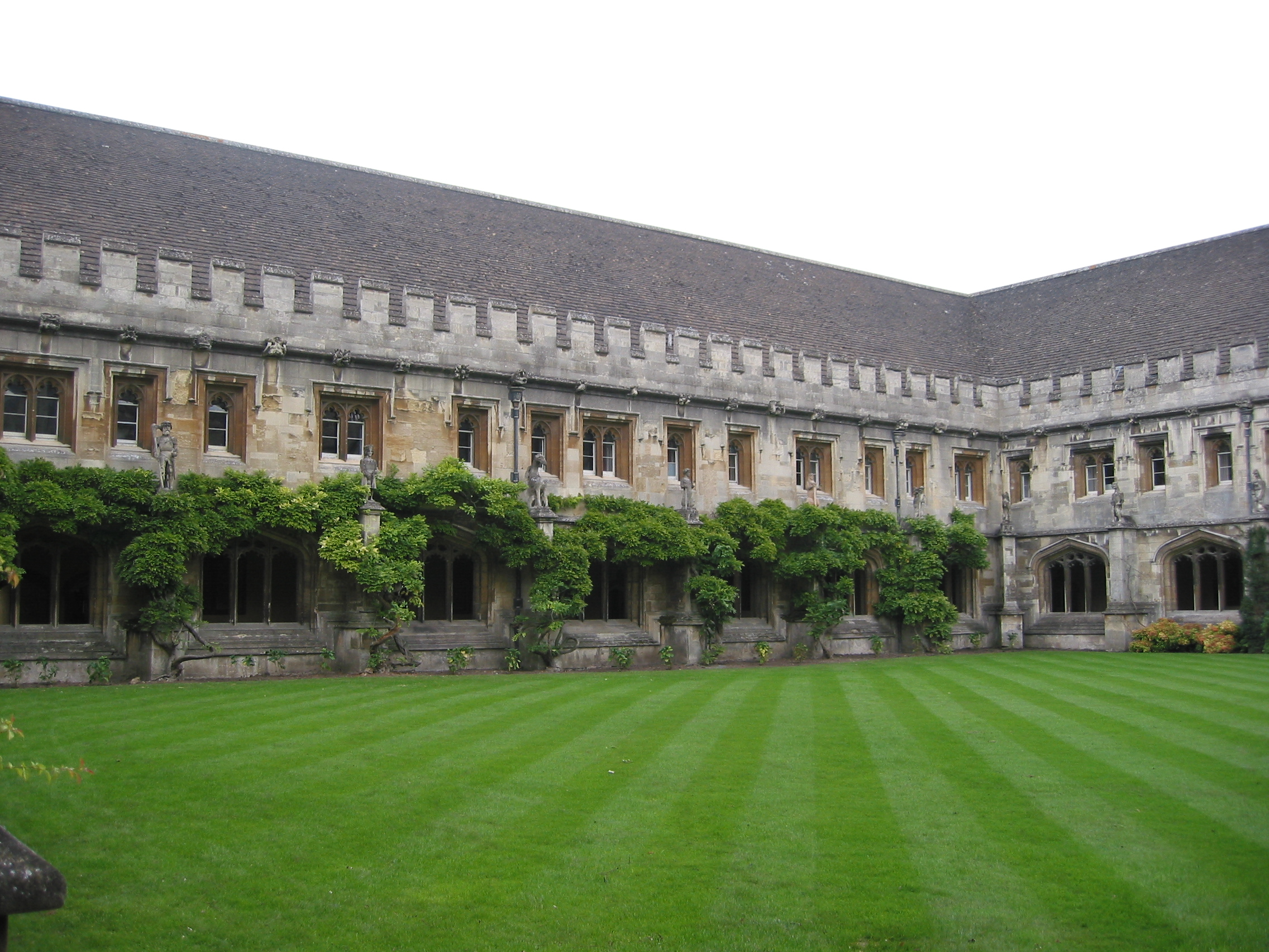 oxford view